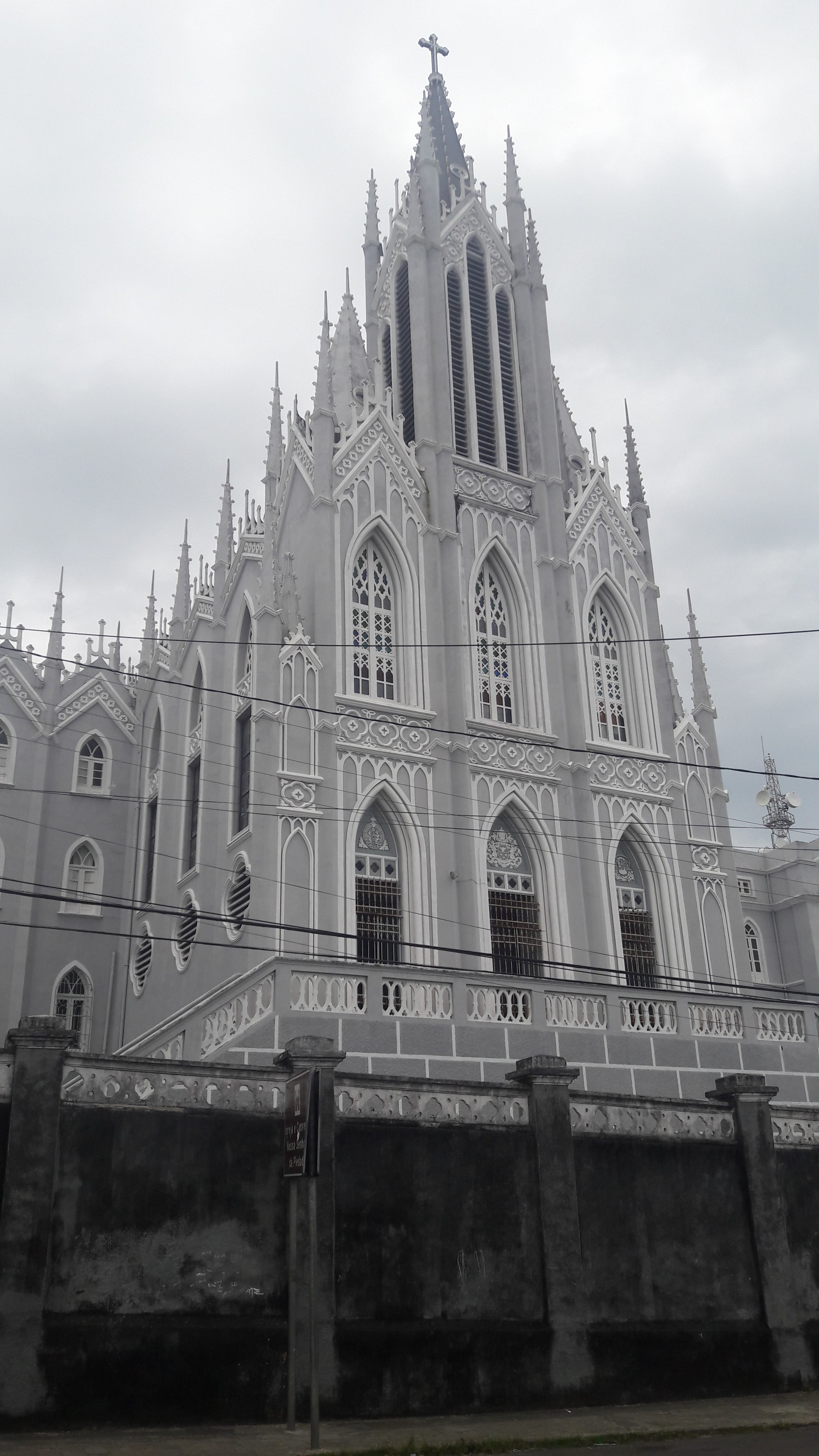 O instituto está localizado no Alto da Piedade, na Rua Madre Thaís, numa área de 75 mil metros quadrados.